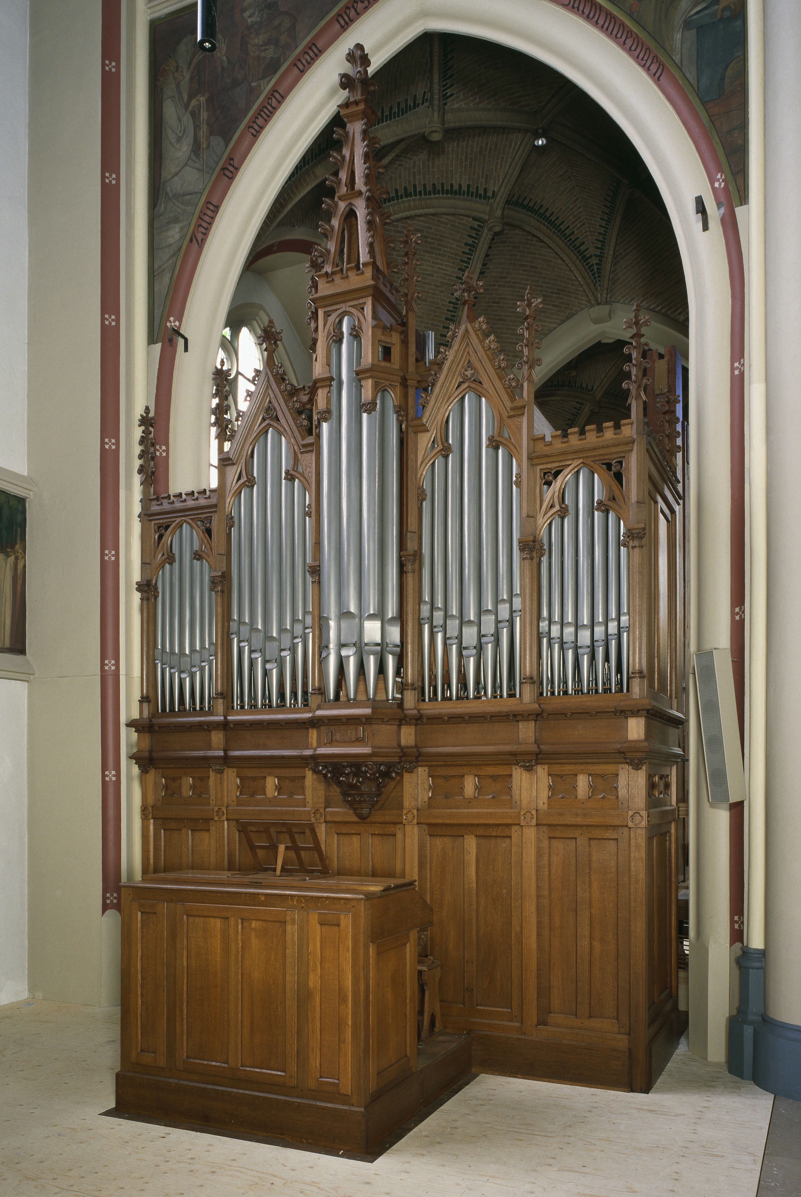 Rooms-katholieke Onze Lieve Vrouwe Tenhemelopneming: Interieur, aanzicht orgel (opmerking: Gefotografeerd voor Het Historische Orgel in Nederland 1894-1901, bladzijde 149)